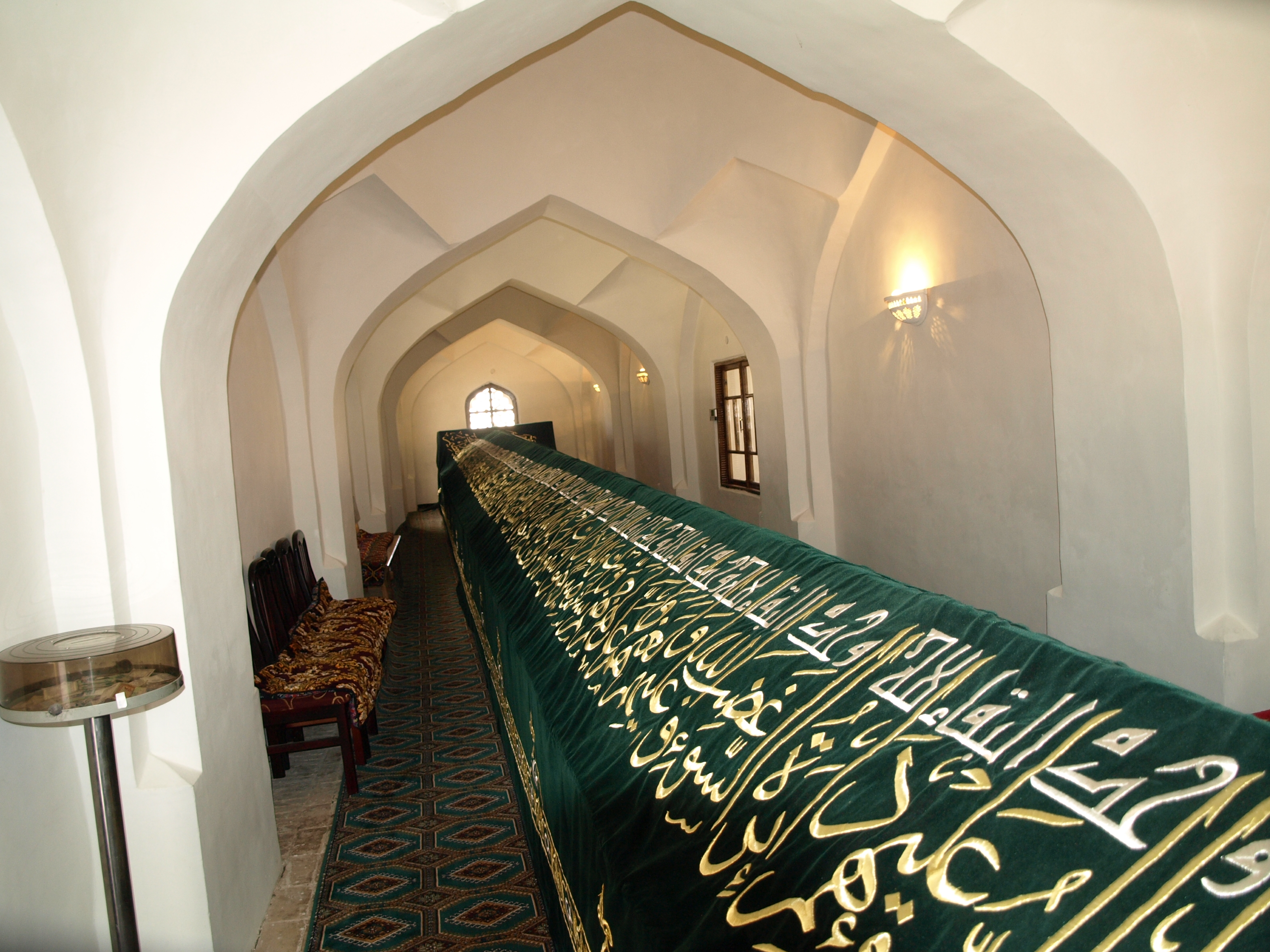 Mazar Khodja Daniayar